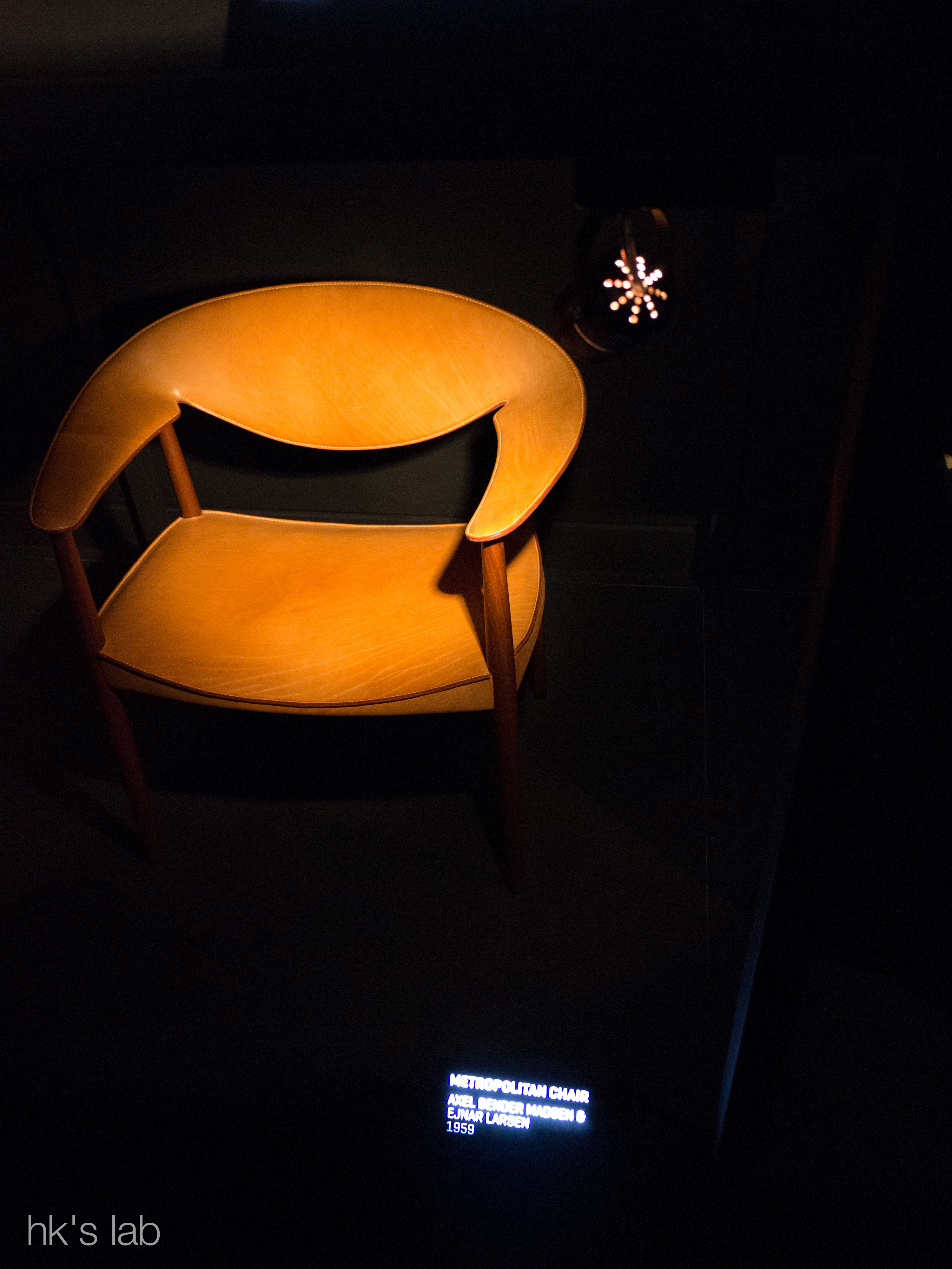 Metropolitan chair designe in 1959 by Ejnar Larsen and Aksel Bender Madsen.